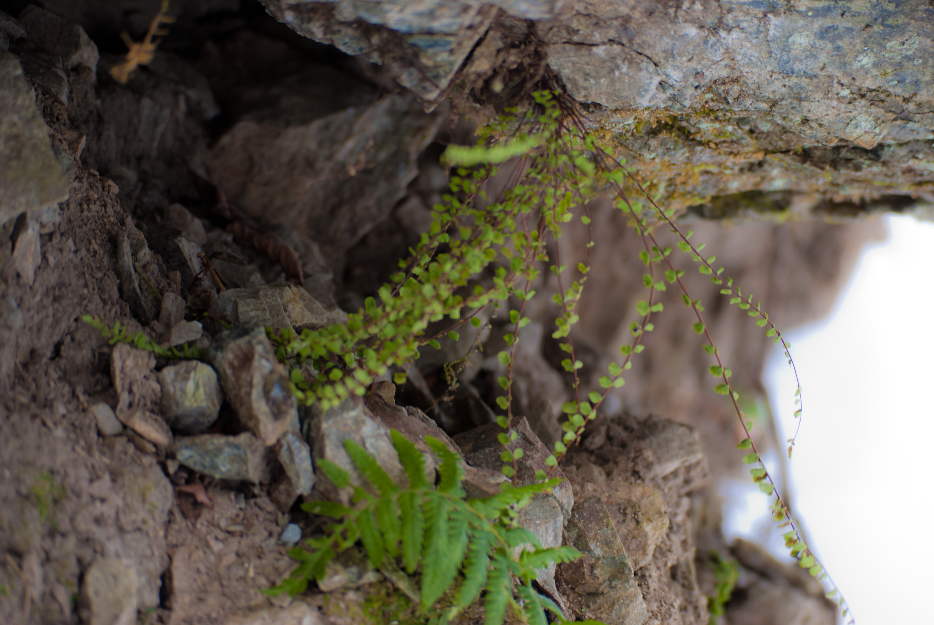 Аспленій волосовидний (Asplenium trichomanes). Мармароський масив Карпатського біосферного заповідника. Також знизу видно пагін Щитника чоловічого (Dryopteris filix-mas).